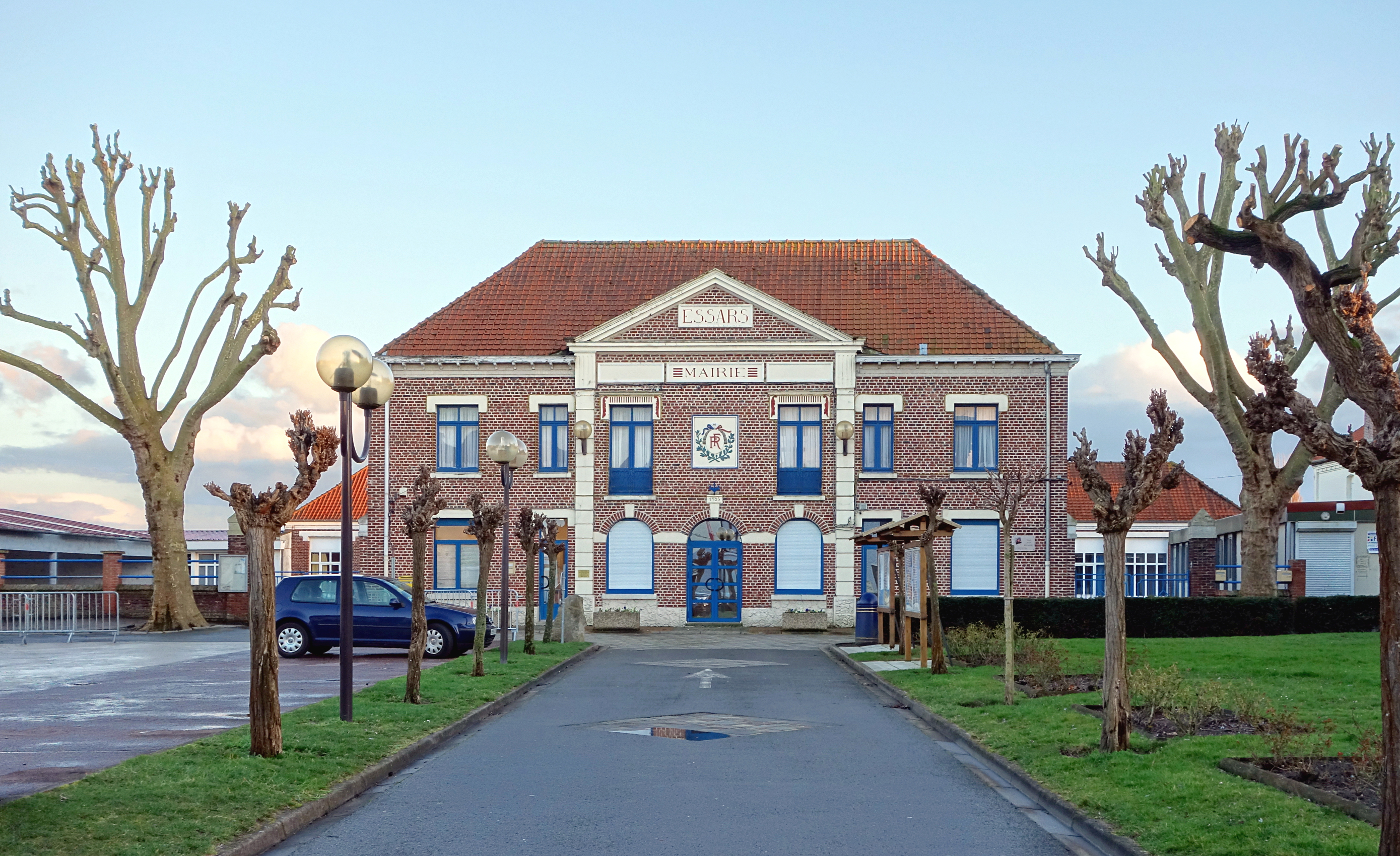 La mairie d'Essars.